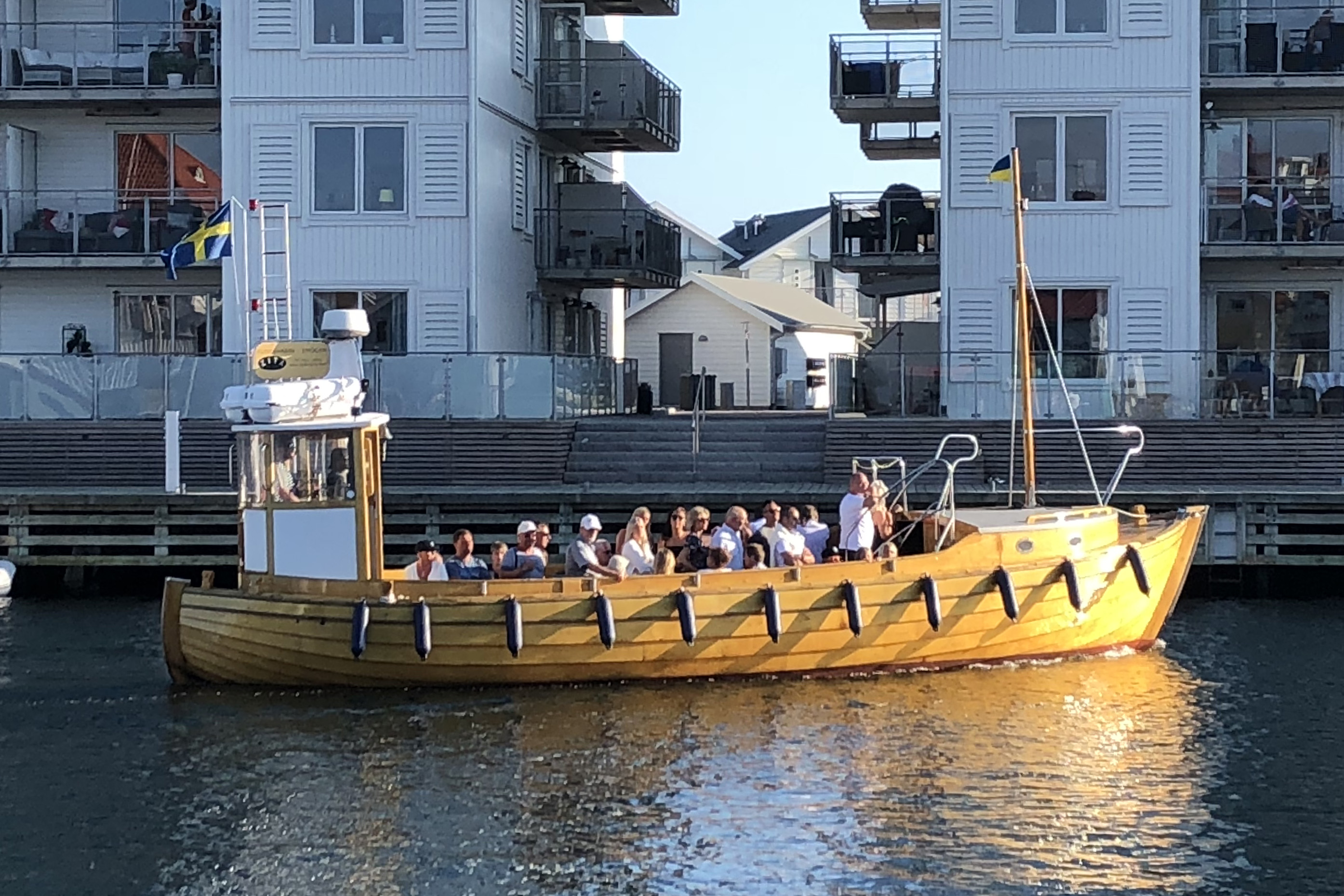 Zitabåtarna på väg mot Smögen. Juli 2018